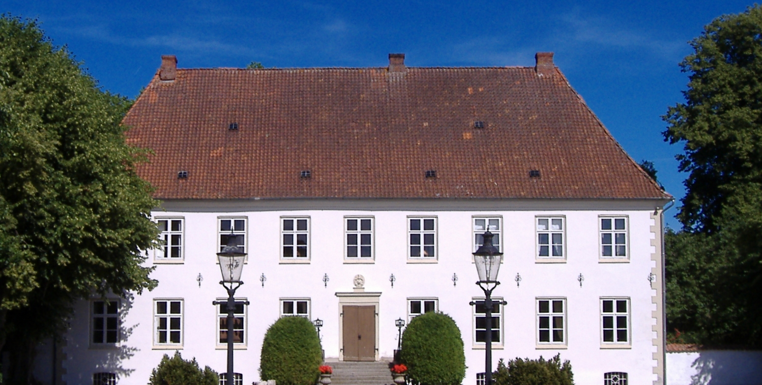 Das Gutshaus Wulfshagen, Gemeinde Tüttendorf